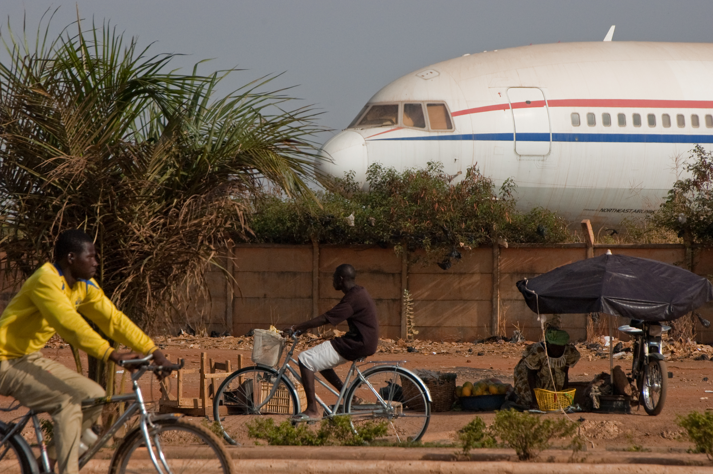 Avion "décoratif" dans l'aéroport de Ouagadougou, en plein centre-ville